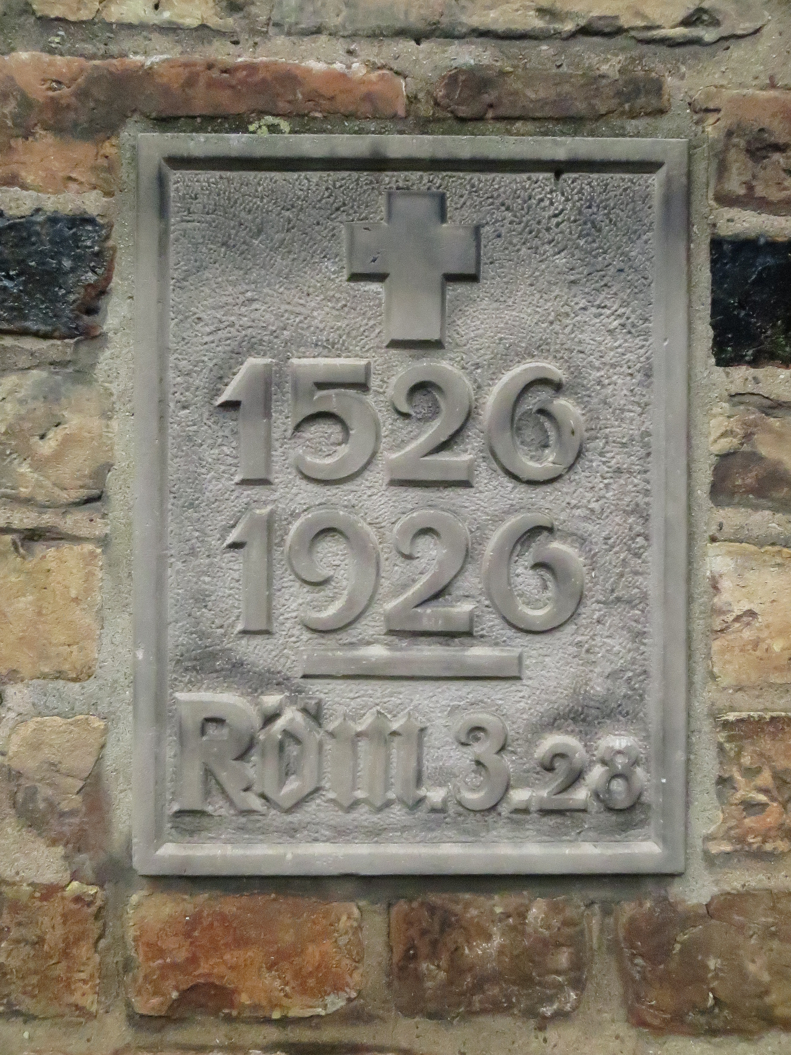 Gedenkstein von 1926 zur ersten lutherischen Predigt 1526 in Flensburg und damit die Einführung der reformatorischen Lehre in Flensburg, Vgl. Römer 3,28, Bild 01